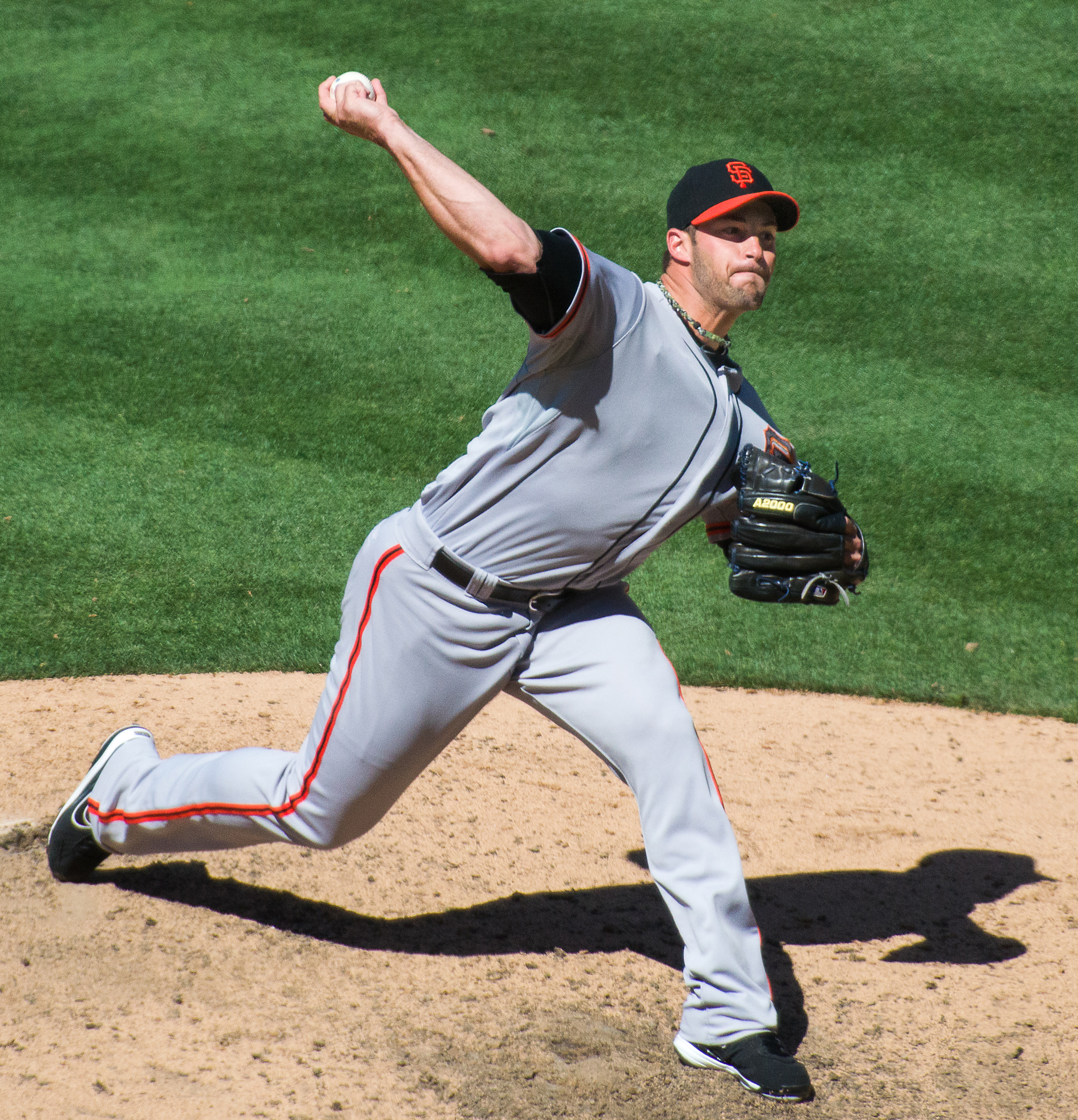 George Kontos